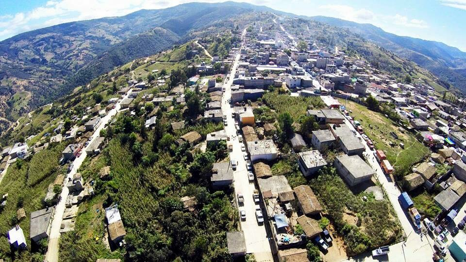 Vista aérea